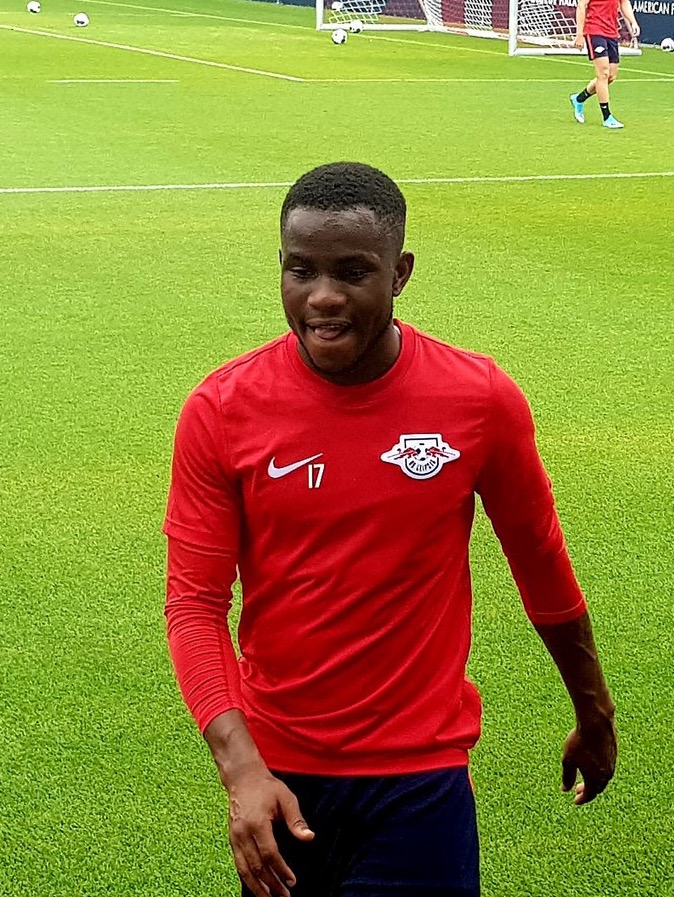 Ademola Lookman im Training von RB Leipzig (2019)